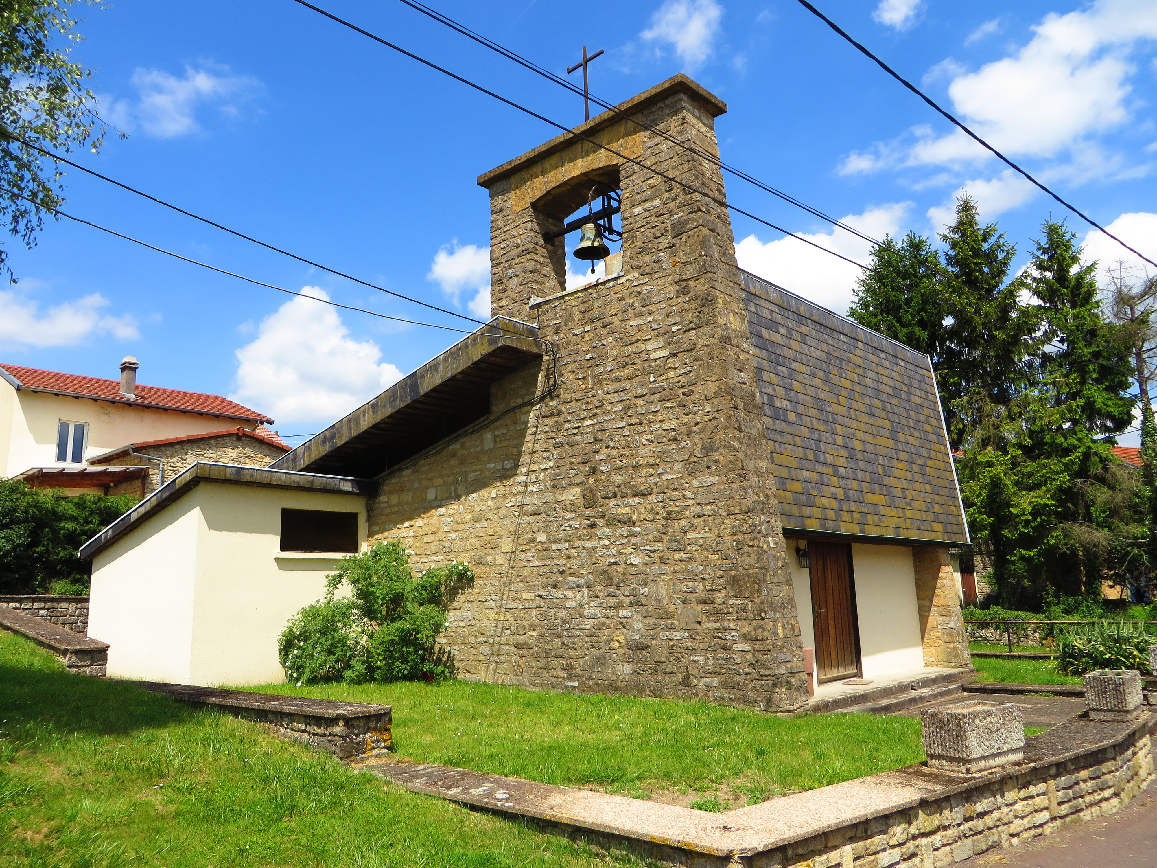 Marange Zondrange chapelle